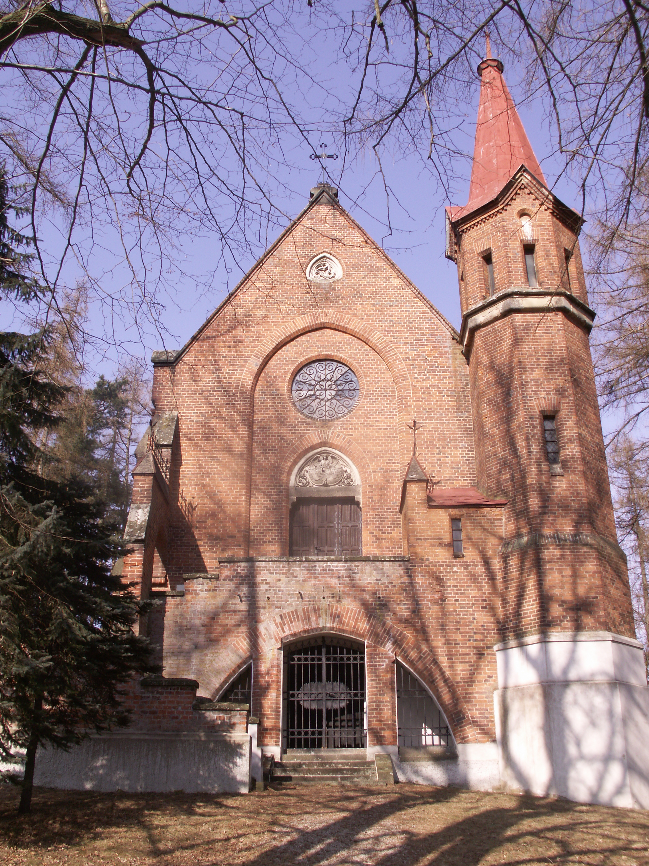 novogotická hrobka Lobkoviců, projekt Augusta Prokopa, Netín, okres Žďár nad Sázavou, kraj Vysočina